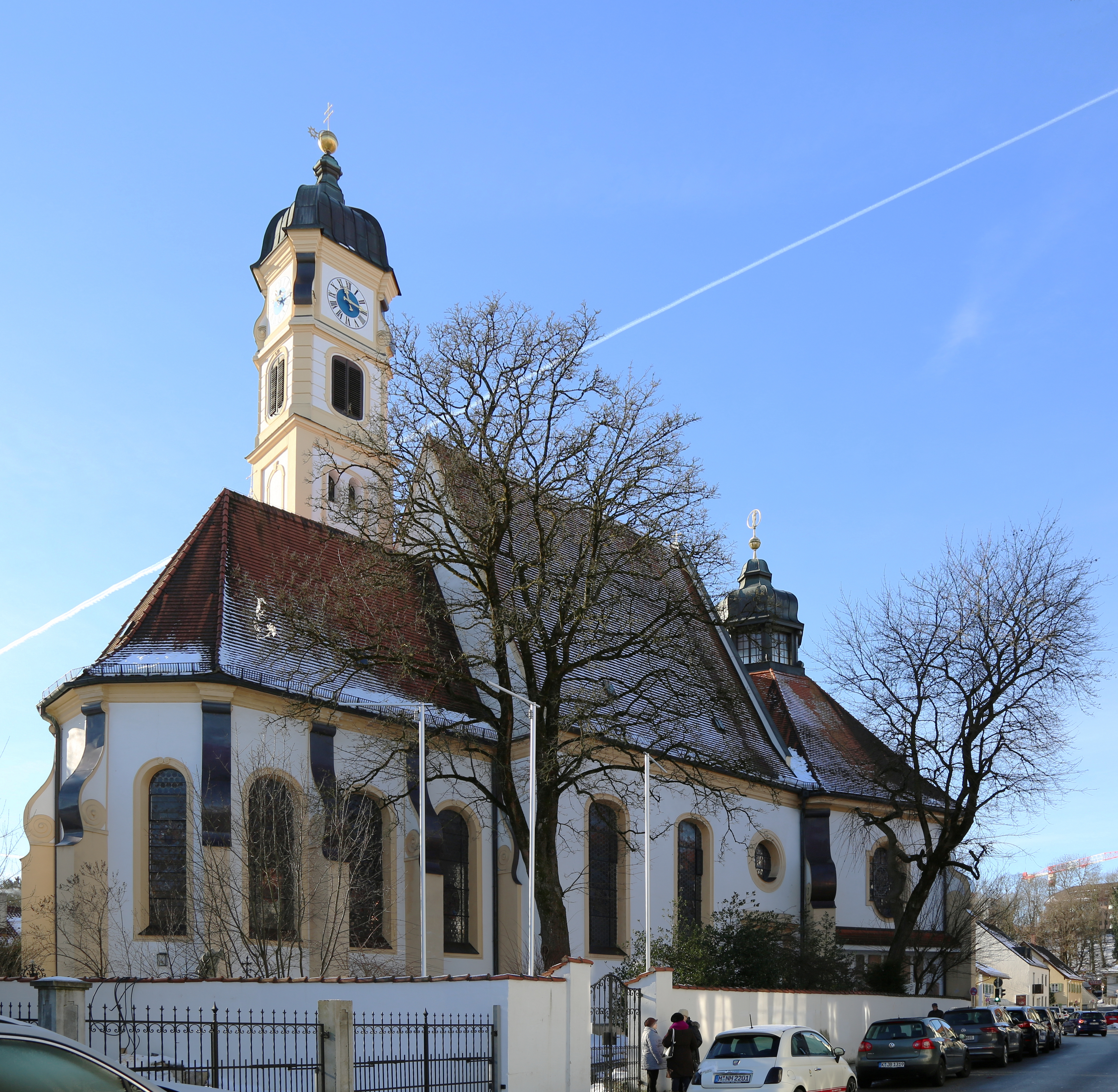 Maria Thalkirchen, Nordfassade